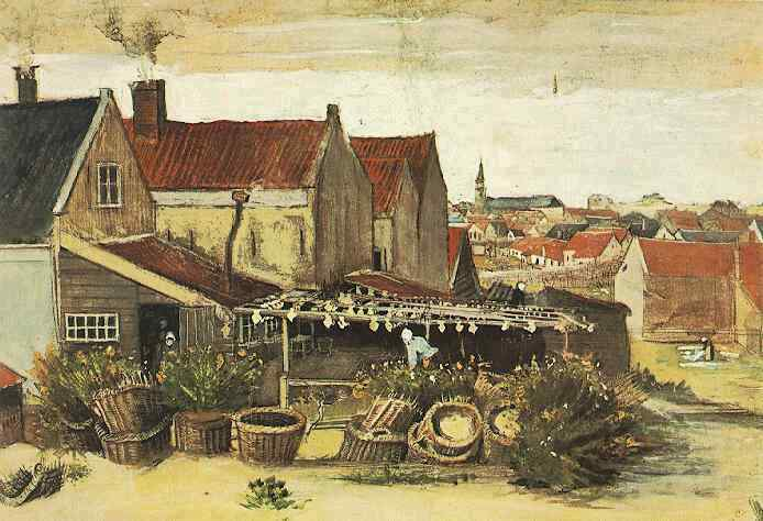 Pintura estancia en La Haya